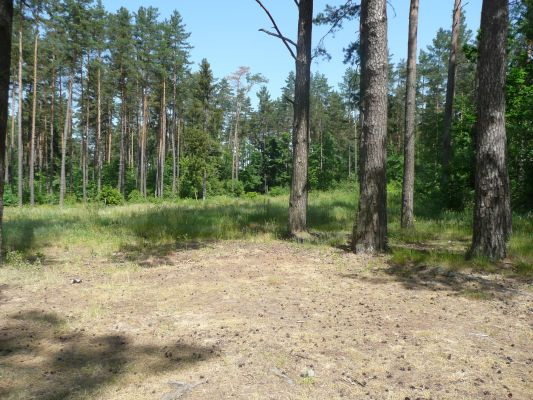 Jezioro Tyrkło, brzeg z borem sosnowym.